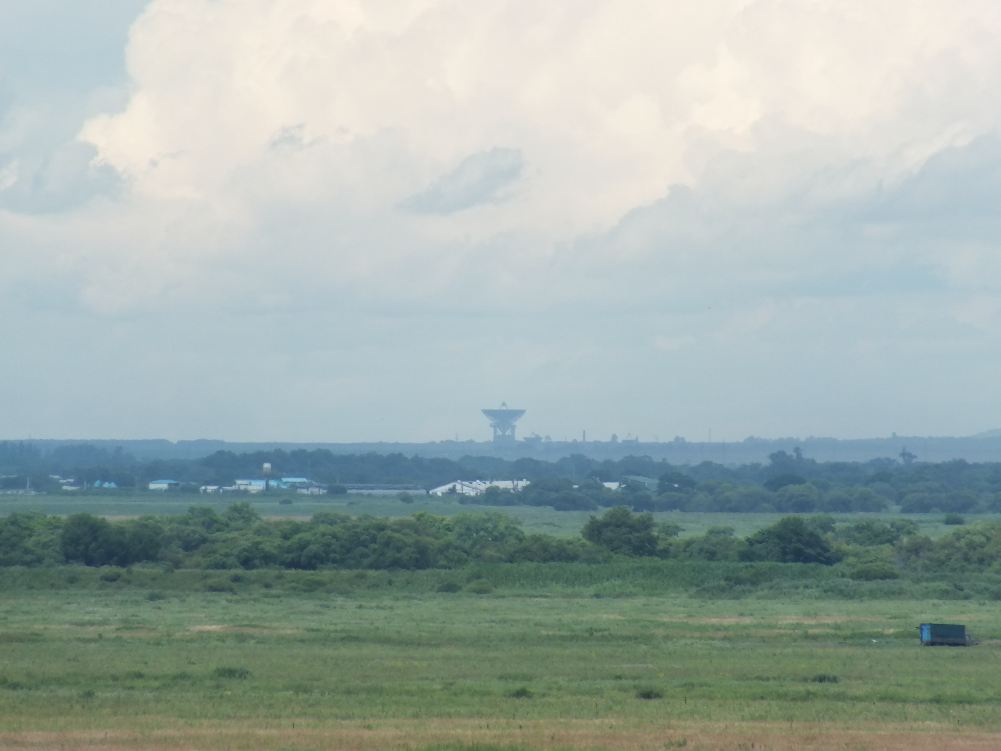 Большая антенна космической связи у села Галенки Вид из окрестностей села Линевичи